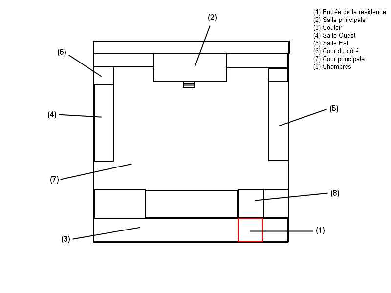 Shéma structurel d'une siheyuan